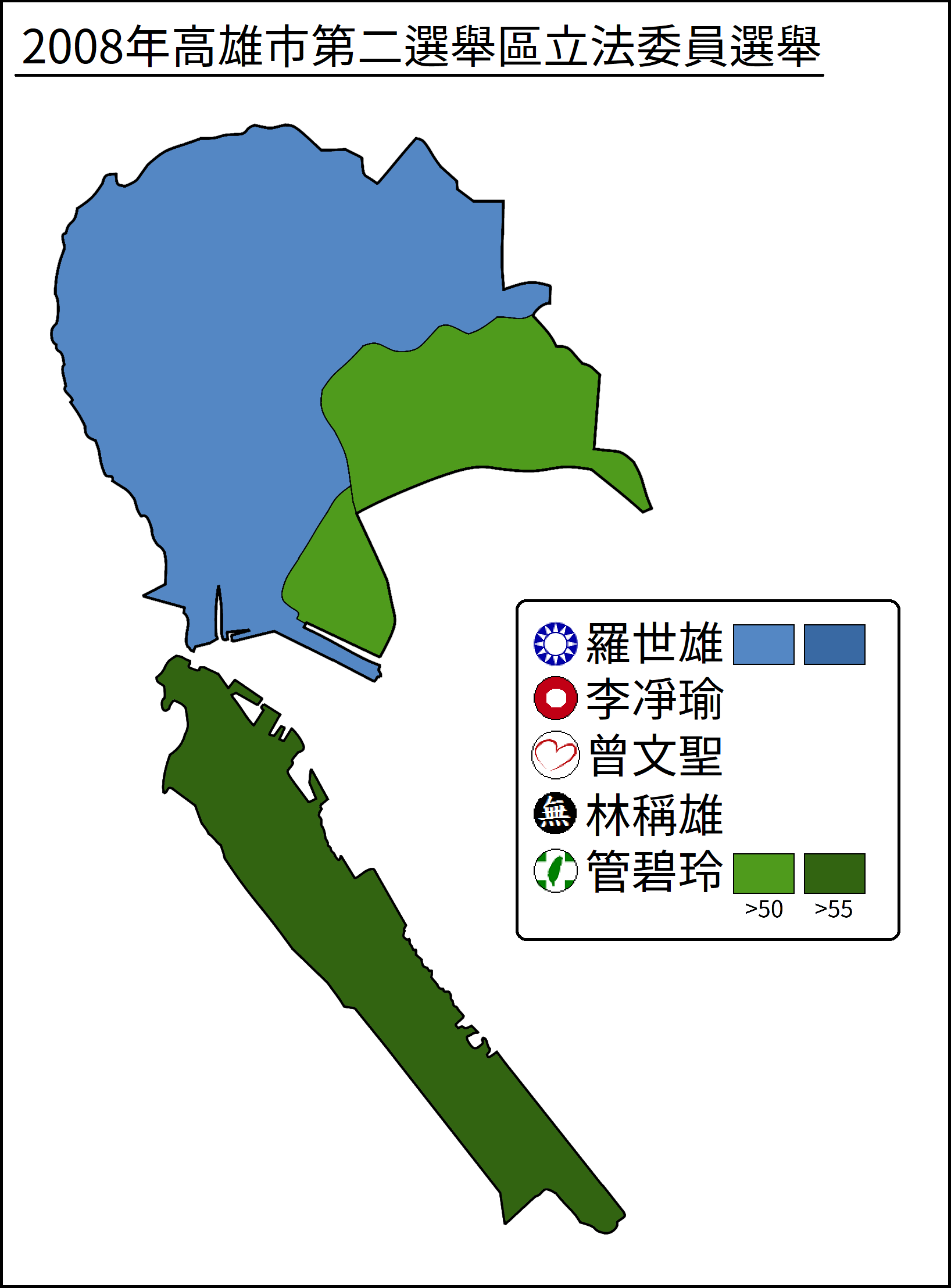 2008年立法委員選舉高雄市第二選舉區